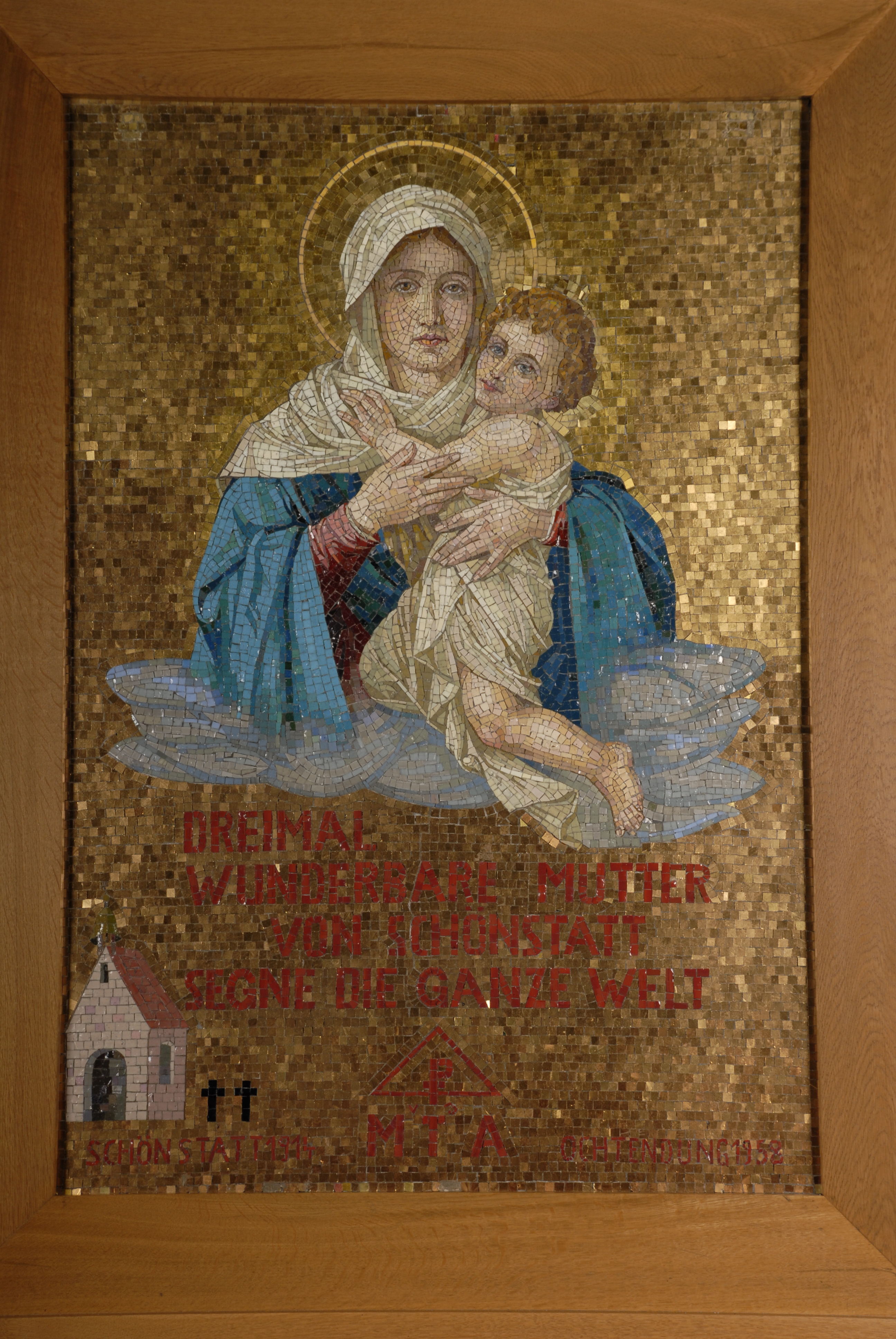 Marienbild aus der Marienkapelle